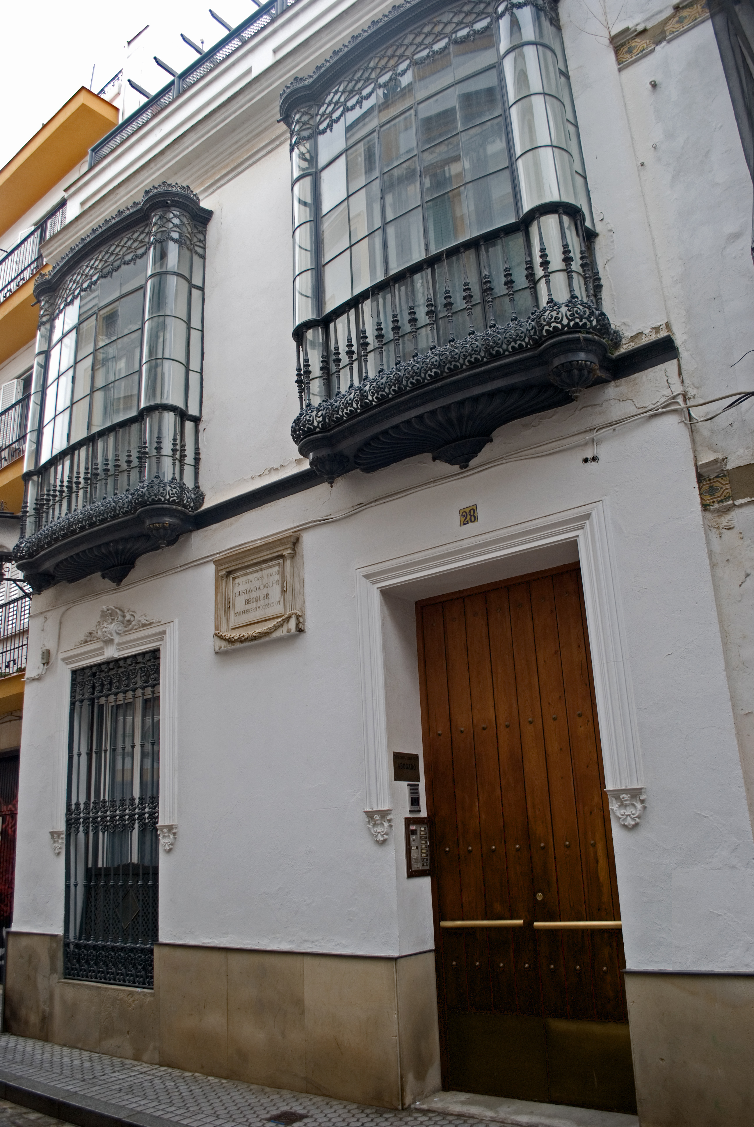 Casa natal del poeta Gustavo Adolfo Bécquer en la actual calle de Conde de Barajas, Sevilla